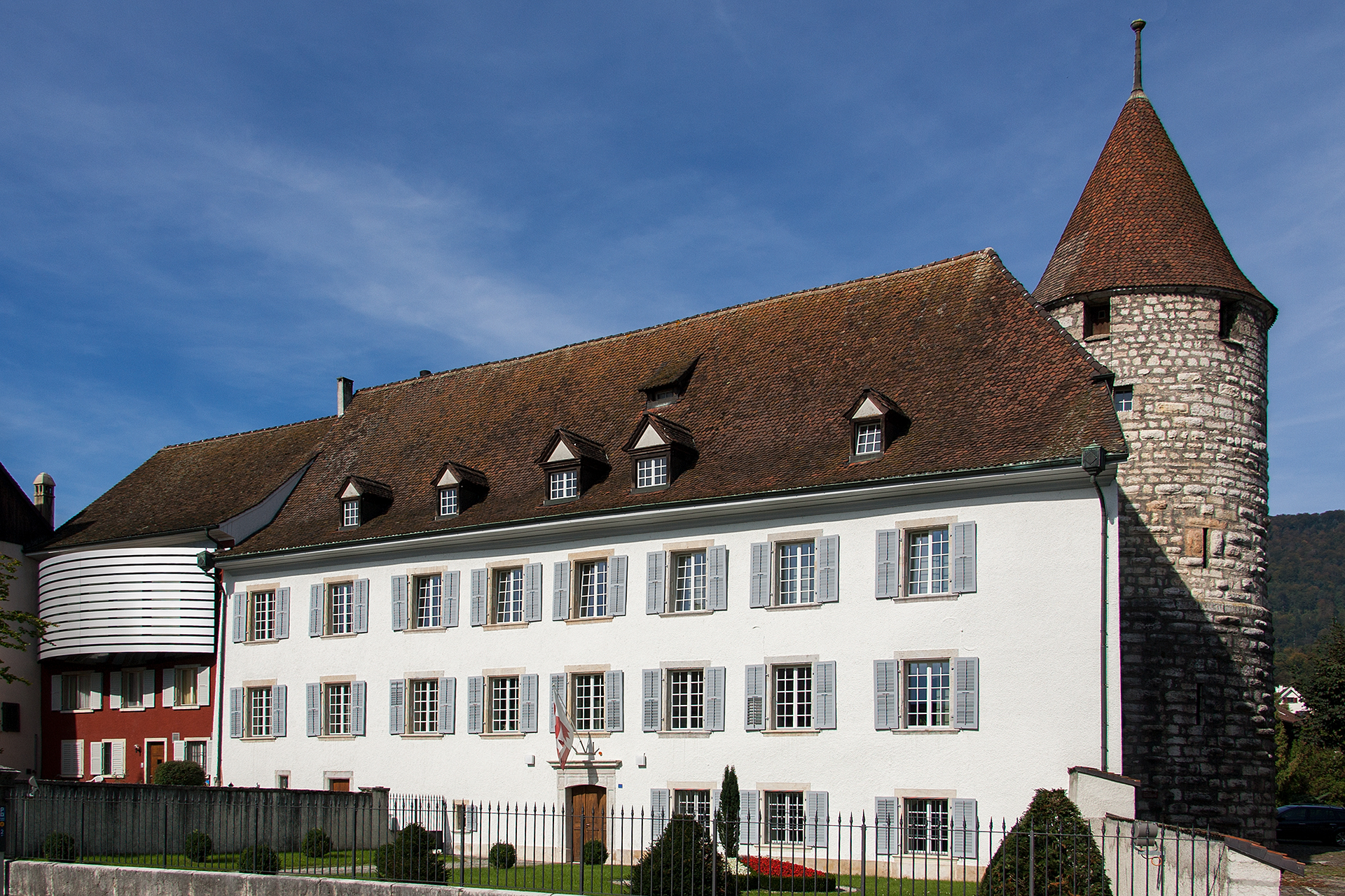 Hôtel du Parlement (Parlamentsgebäude) in Delémont (Delsberg)